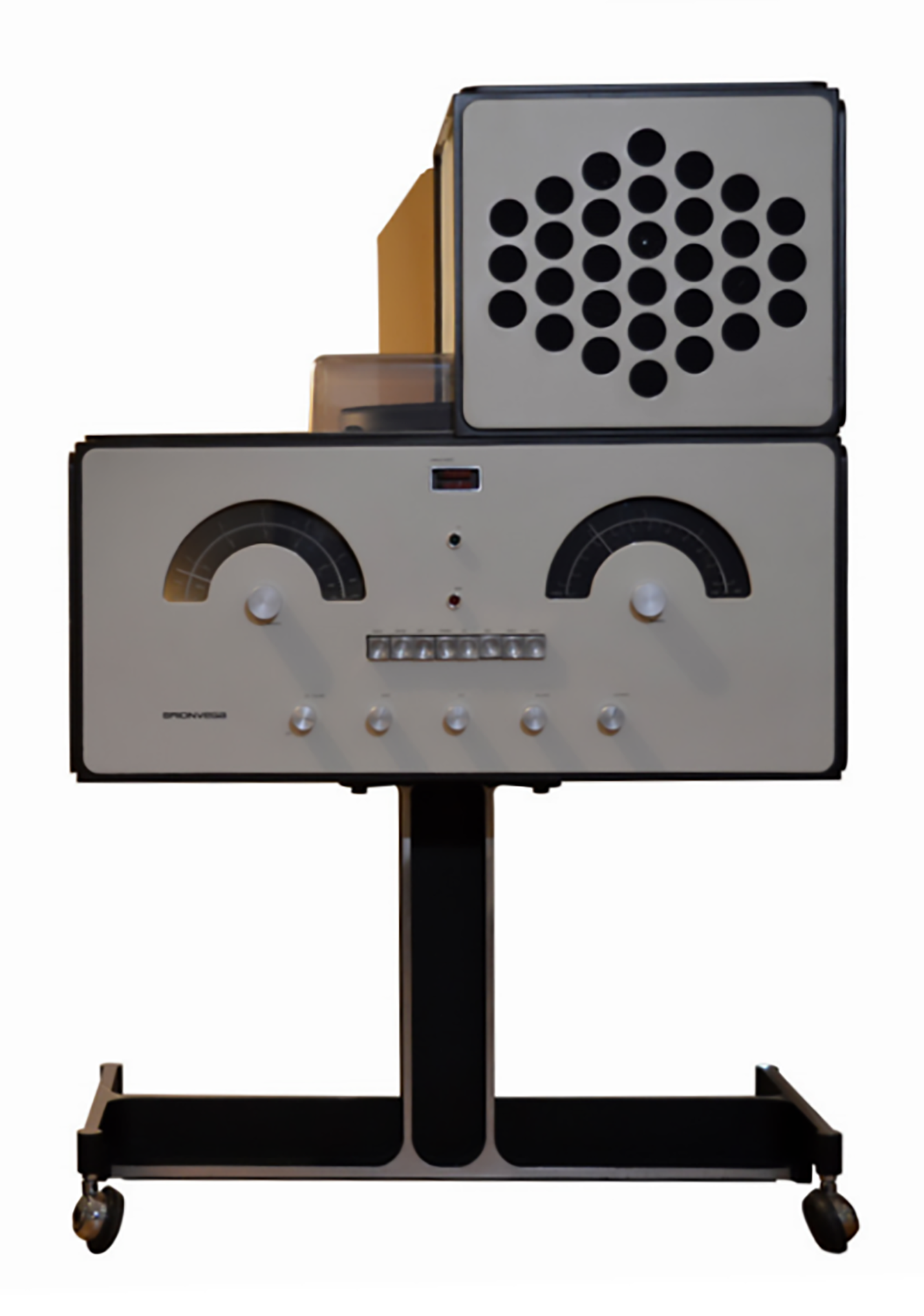 Vèneto: RR 126 scocca color bianco scattata durante la mostra dei Castiglioni di Pordenone, 2019